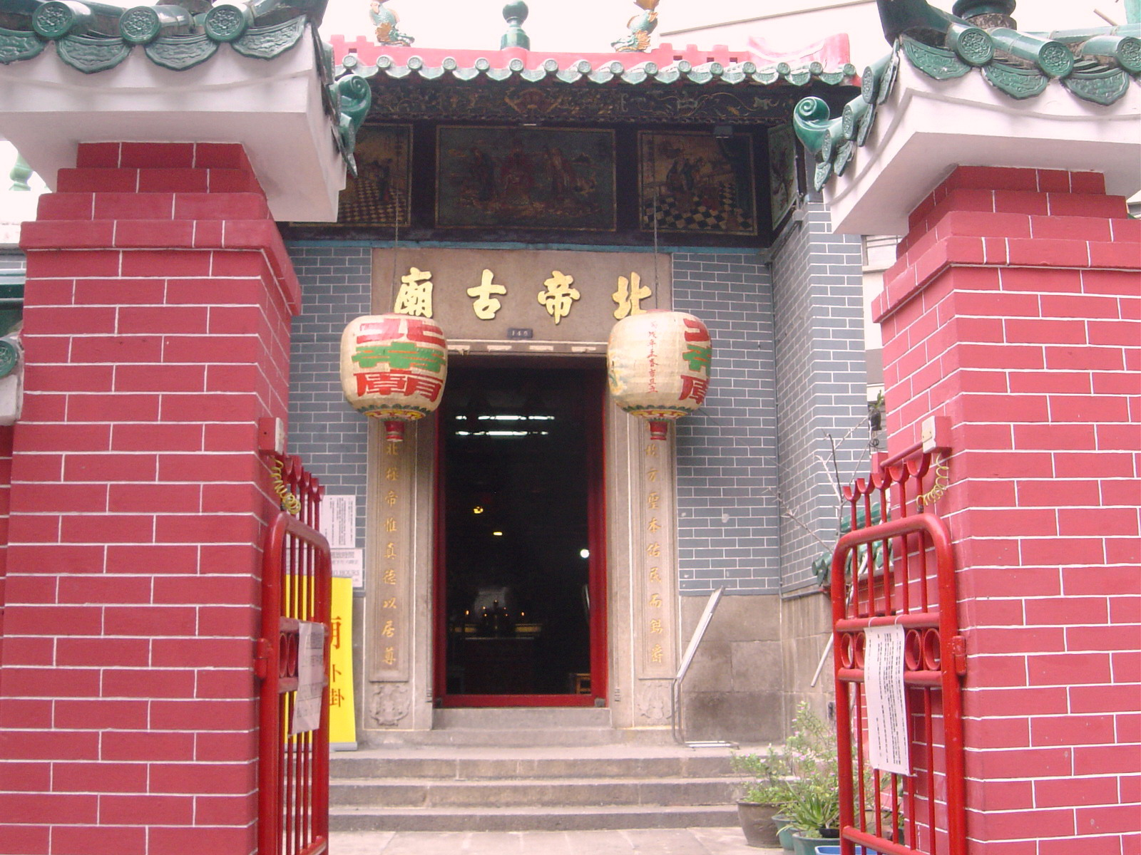 香港紅磡北帝廟。